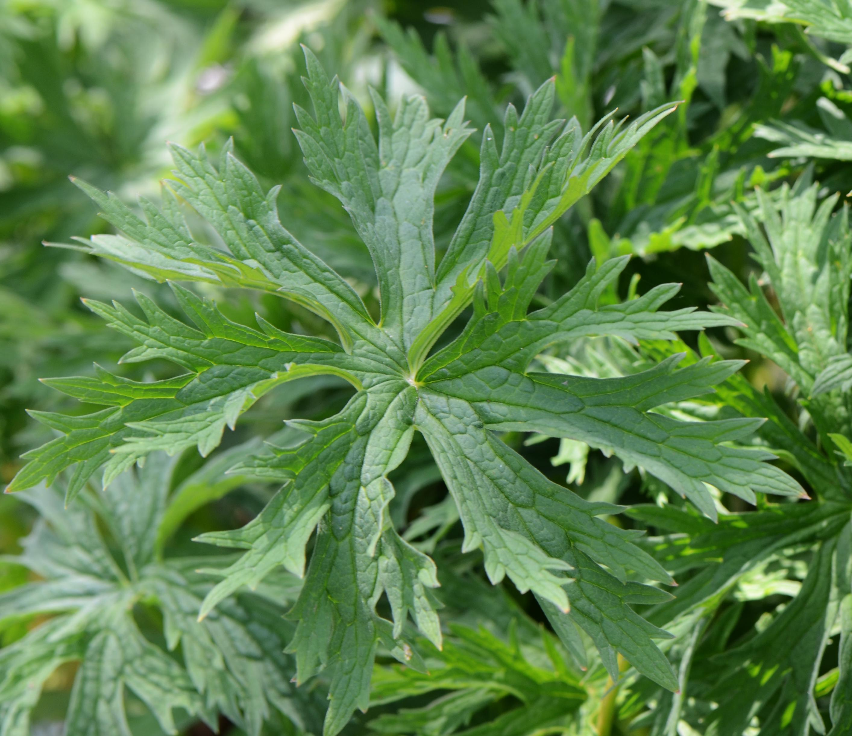 Geranium pratense, Jardin des Plantes de Paris